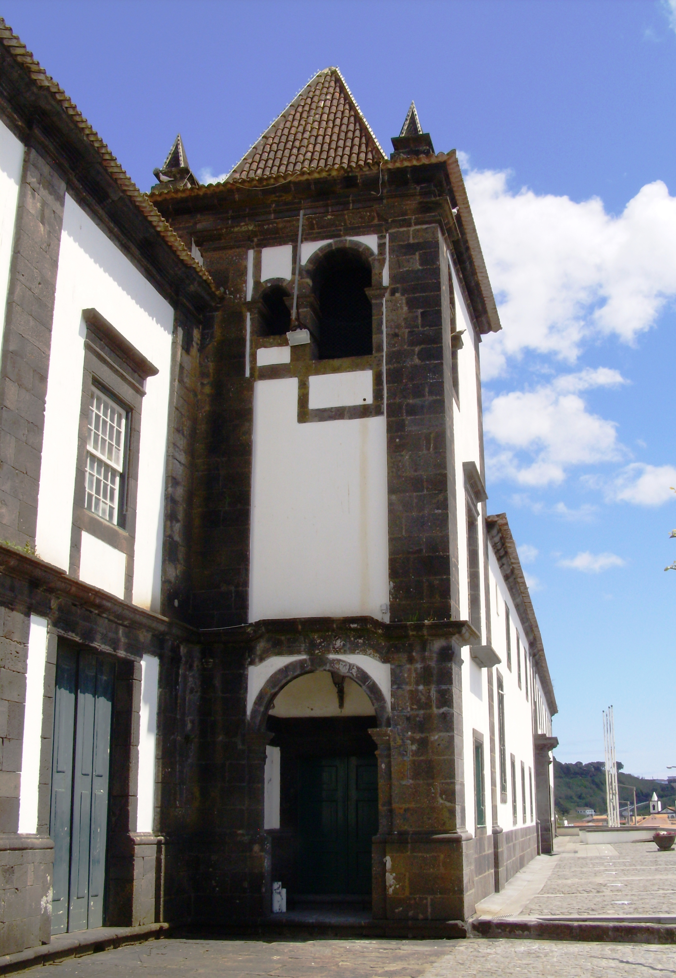 Convento dos Franciscanos e Igreja de Nossa Senhora da Conceição, freguesia e concelho de Lajes do Pico, ilha do Pico, Açores: aspecto da torre.